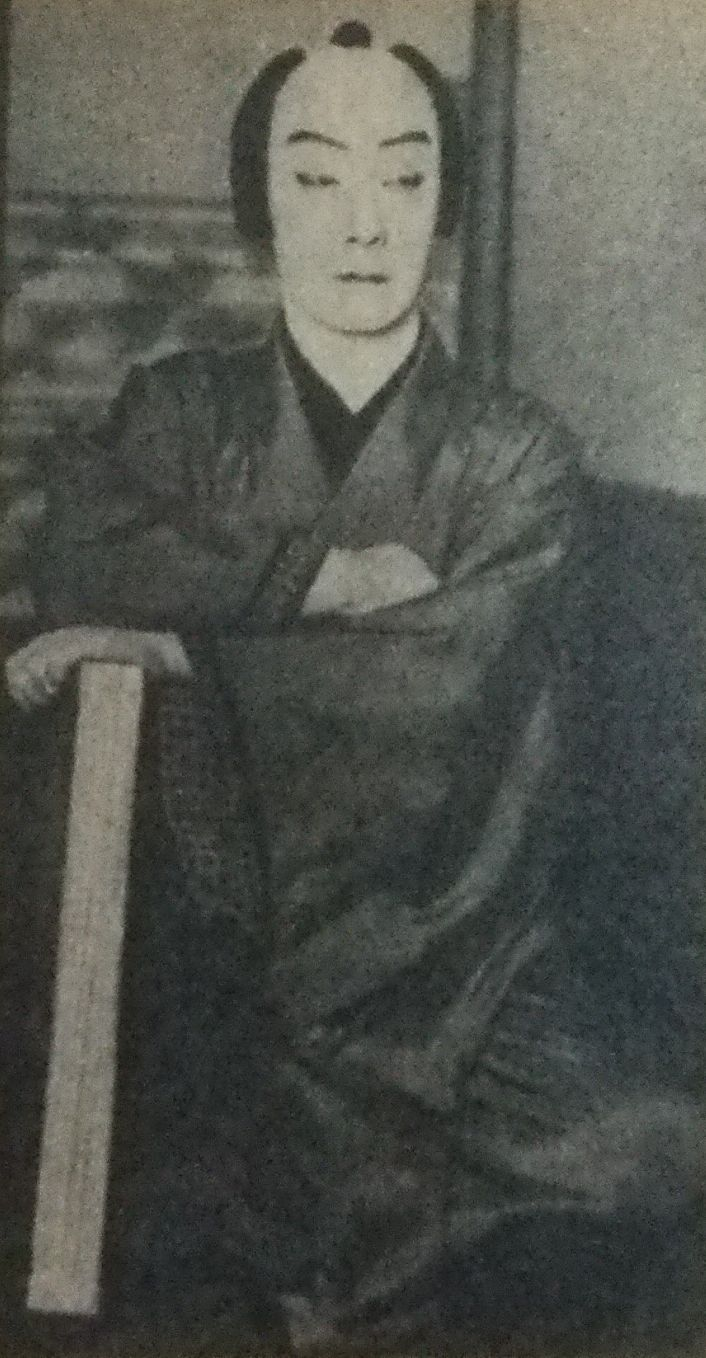 初代中村鴈治郎による紙屋治兵衛